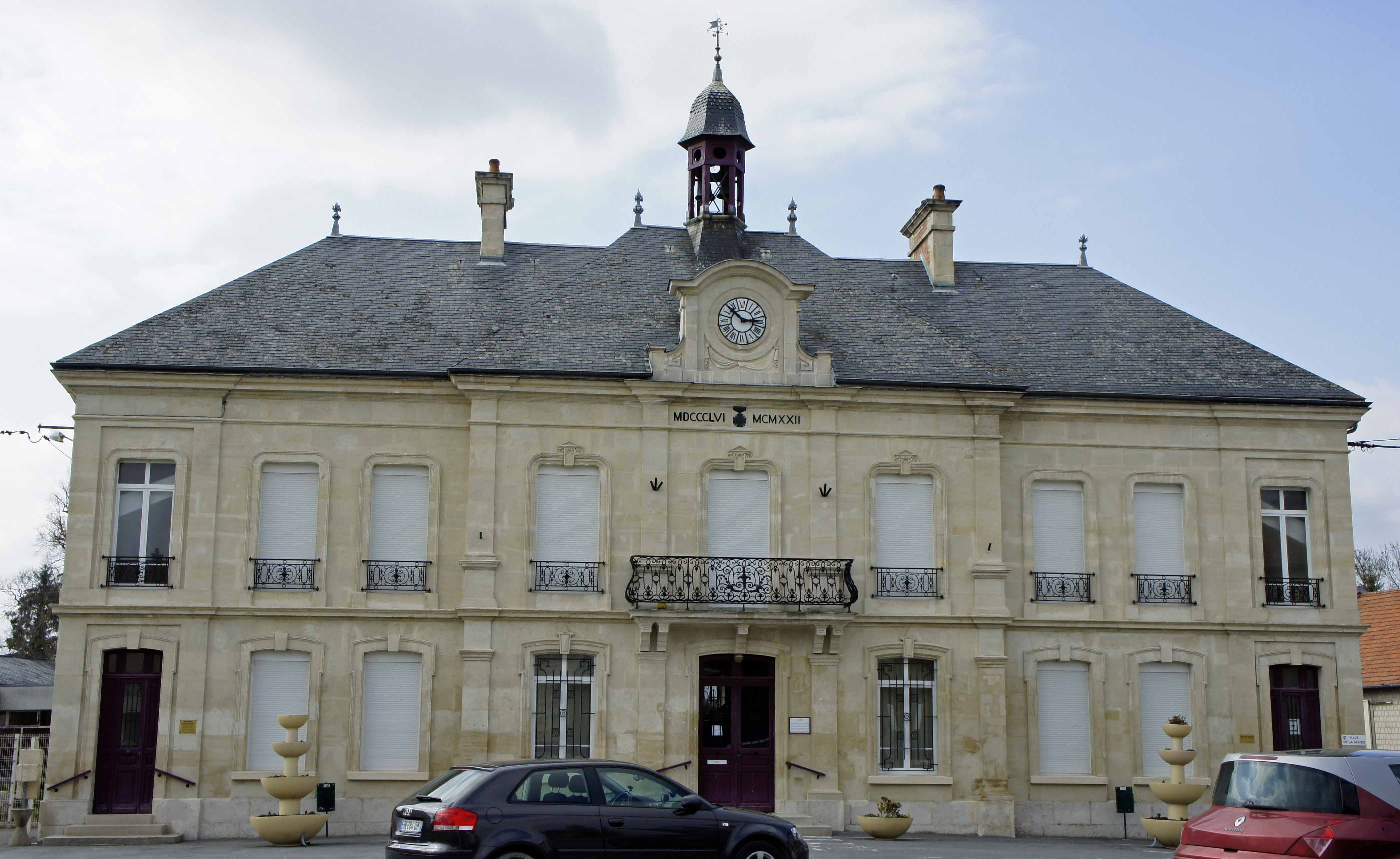 Vue de la Mairie de BOult sur Suippe.